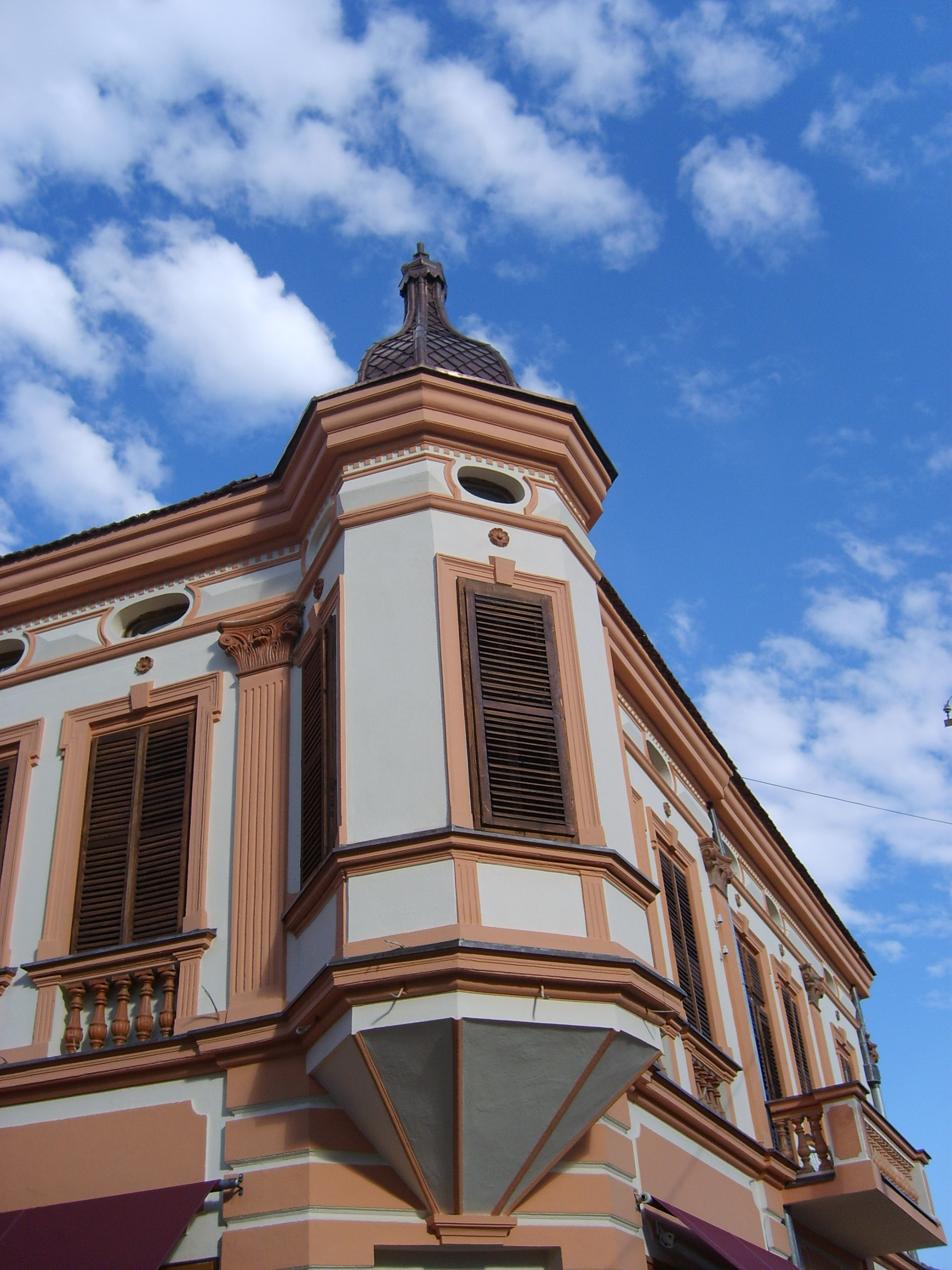 Традиционална архитектура